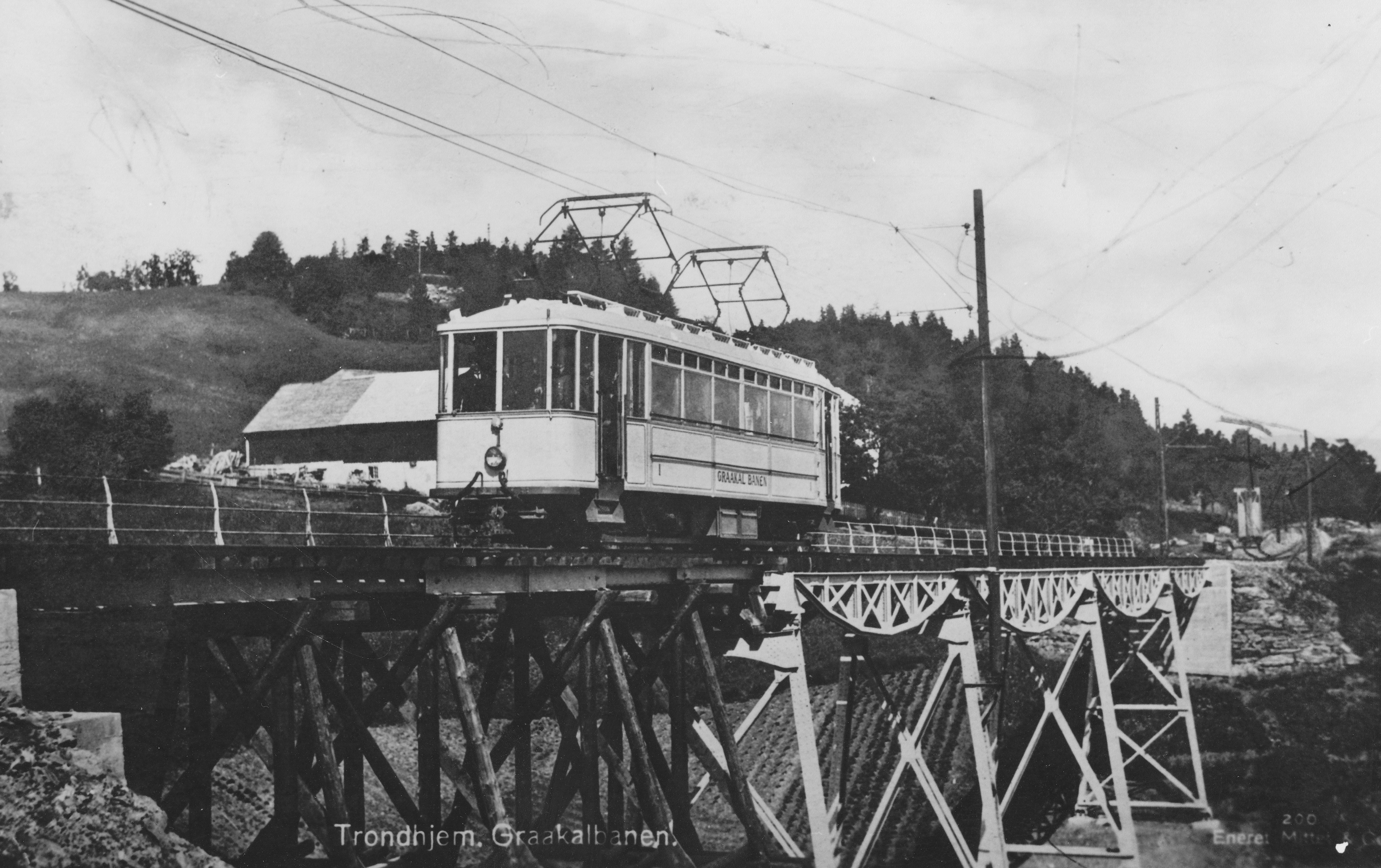 Graakallbanen. Hoemsbrua. Fra et postkort. Mittet & Co, ukjent år.